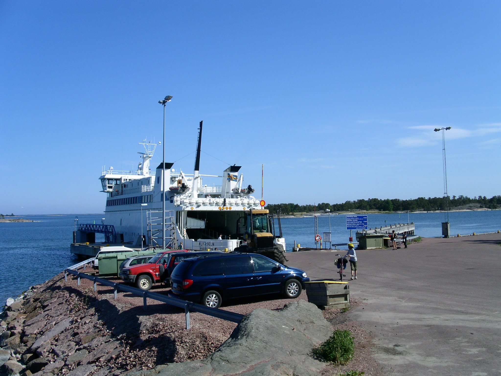 Alfågeln, färja, vid hamn på Vårdö, Åland